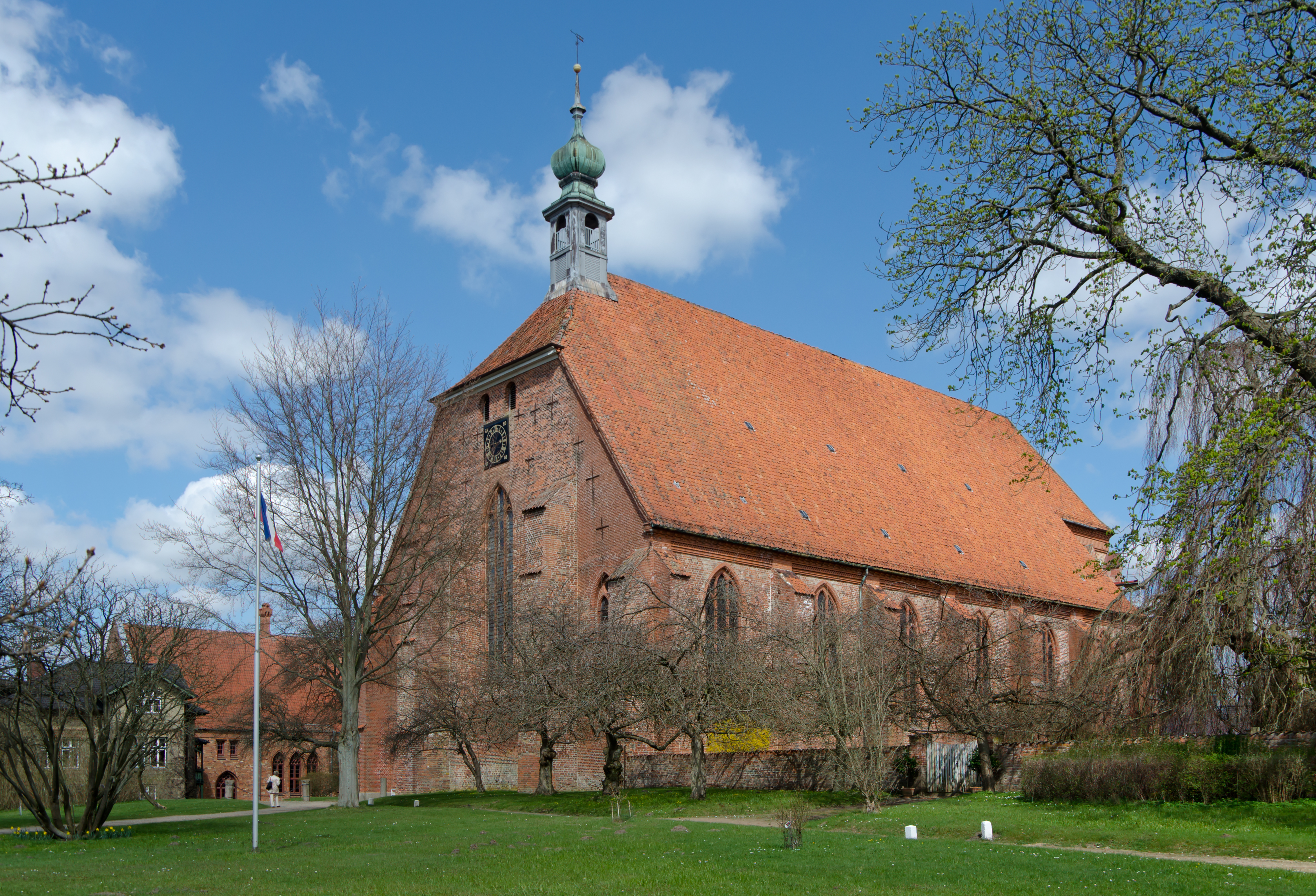 Preetz Klosterhof Klosterkirche